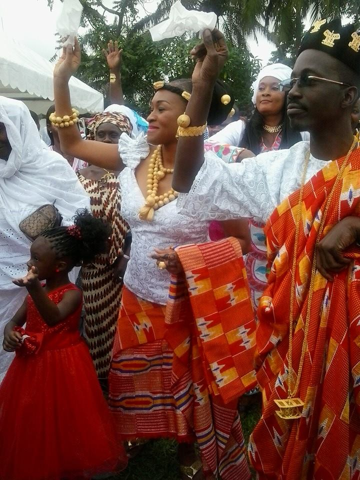 tenus Dioula portés lors du mariage en cote d' ivoire This is an image of Cultural Fashion or Adornment from Côte d'Ivoire